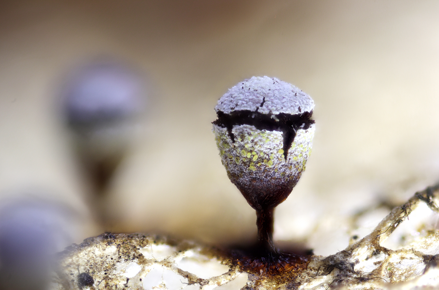 Craterium leucocephalum auf Falllaub von Elsbeere